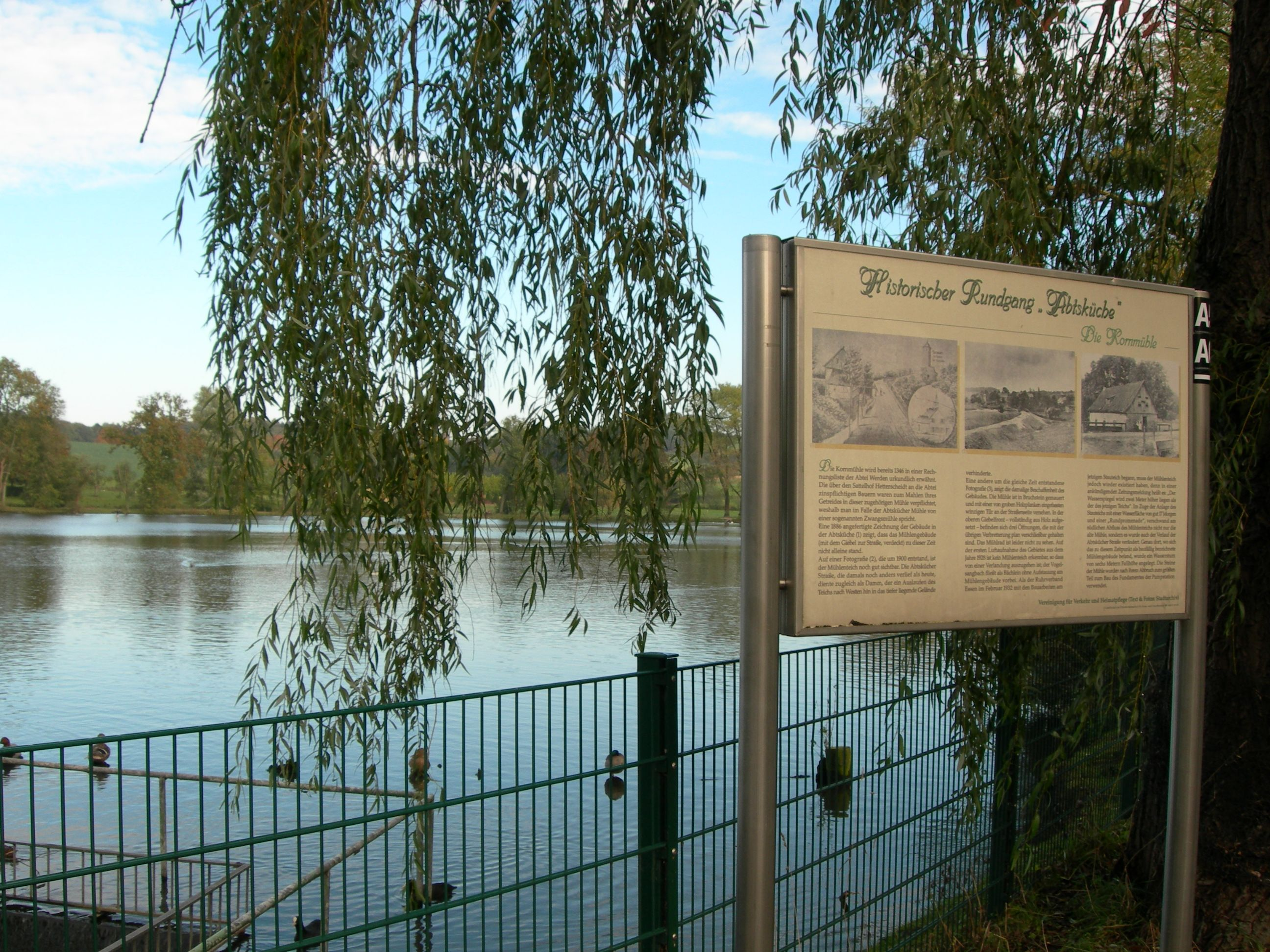 Abtskücher Stauteich, Heiligenhaus, gegenüber Kapelle